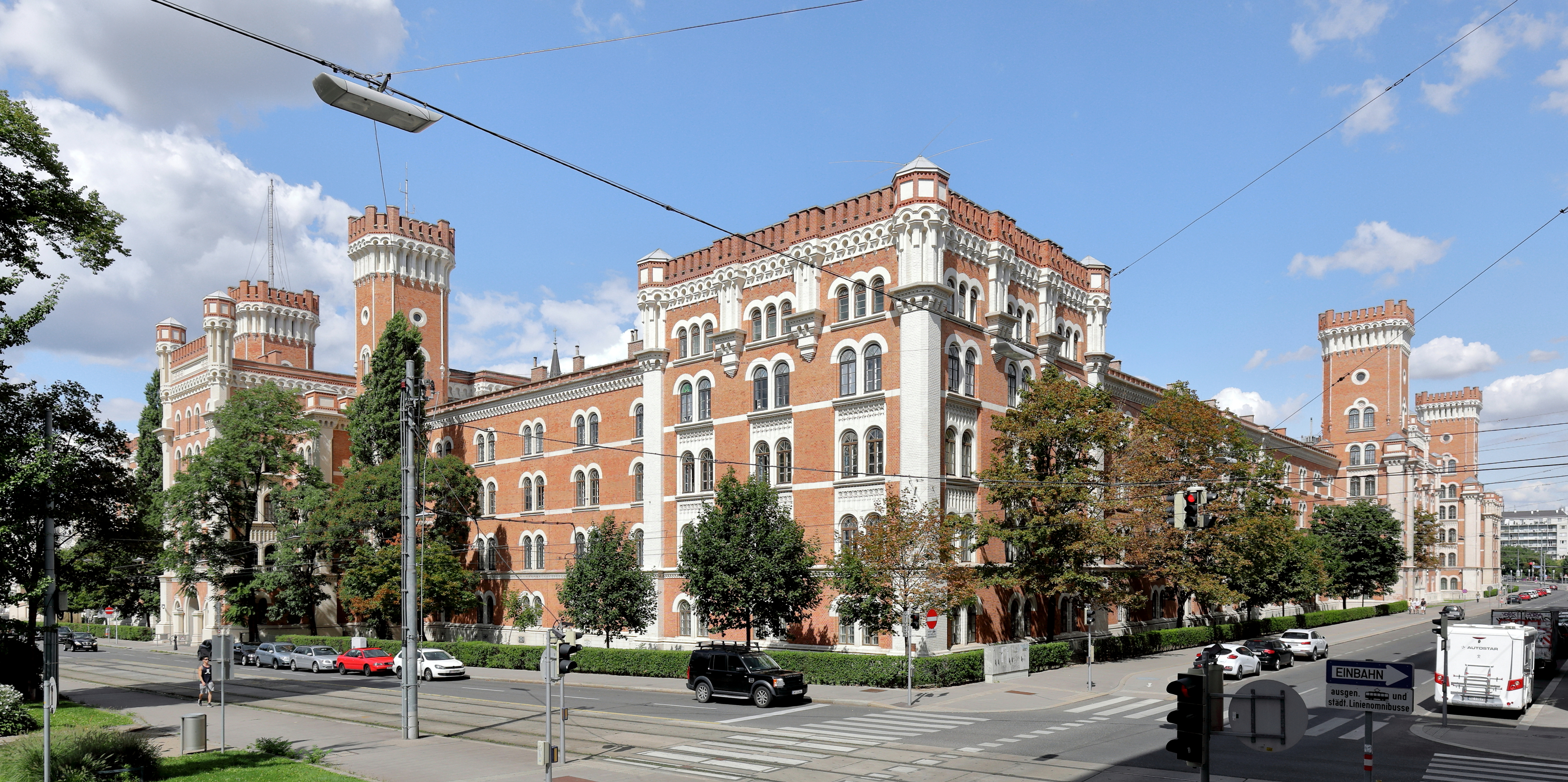 Südansicht der Rossauer-Kaserne im 9. Wiener Gemeindebezirk Alsergrund.Das Gebäude im Windsor-Stil (veralteter Nachläufer des romantischen Historismus) wurde ab 1865 nach Plänen des Obersten des Geniestabs Karl Pilhal und des Majors Karl Markl errichtet und am 17. August 1870 als Kronprinz-Rudolph-Kaserne der Benützung übergeben. Als „Defensivkaserne" hat sie einen festungsartigen Charakter. Errichtet wurde sie auf einem 43.293 Quadratmeter großen Grundstück mit einer Länge von 270 Meter und einer Breite von 140 Meter. An der Außenfront gibt es rund 1.300 Fenster.